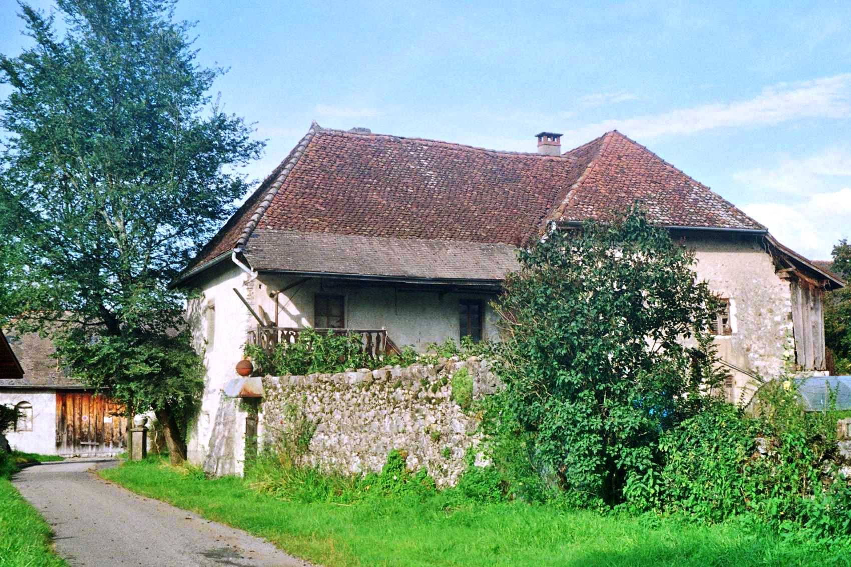 Seynod (Haute-Savoie, France), ancienne route de Branchy : maison ancienne typique de la région, août 2007. La grange à l'arrière-plan a été rasée en 2009 ou 2010 pour faire place à un lotissement.